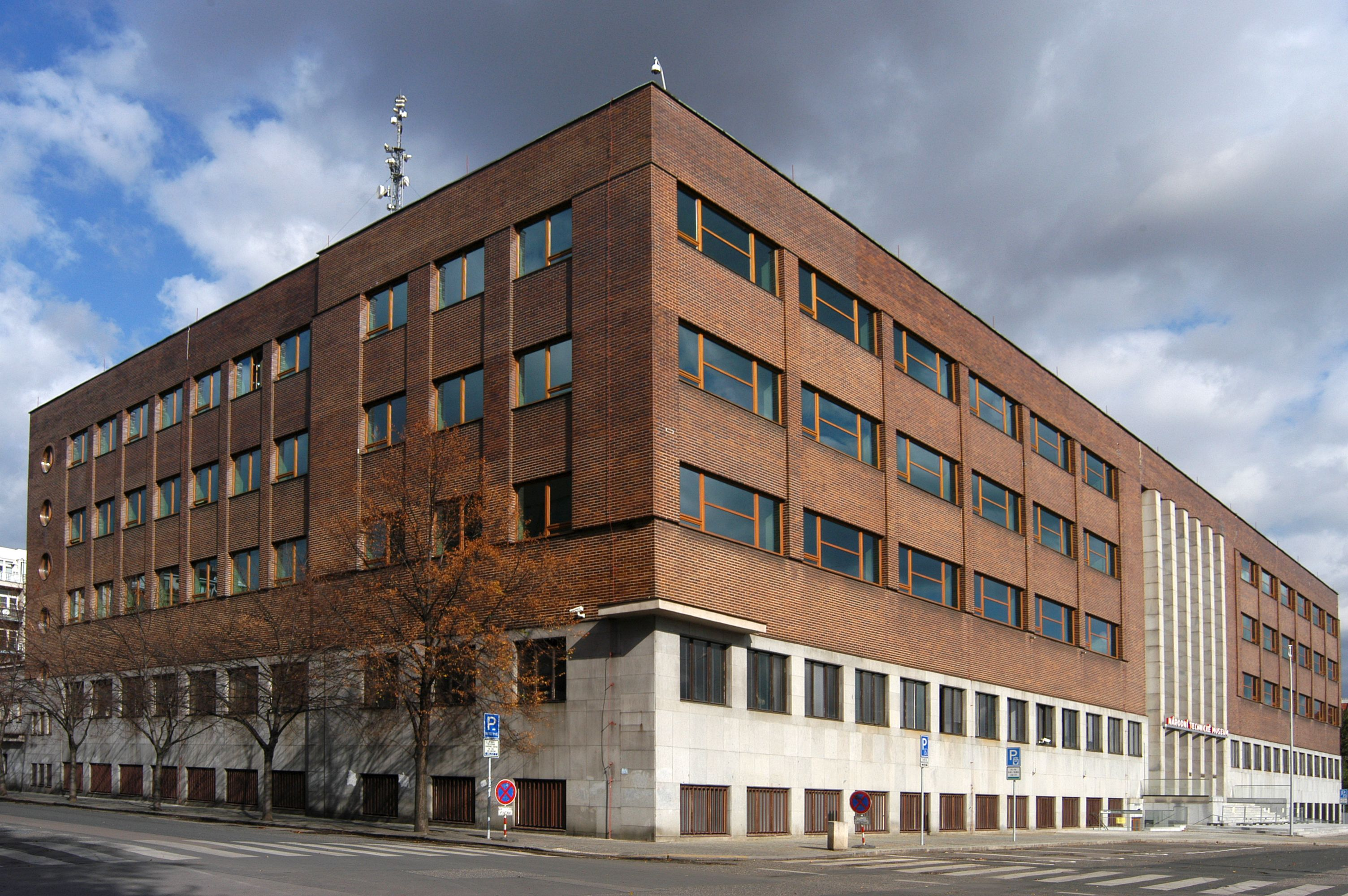 Budova Národního technického muzea na Letné